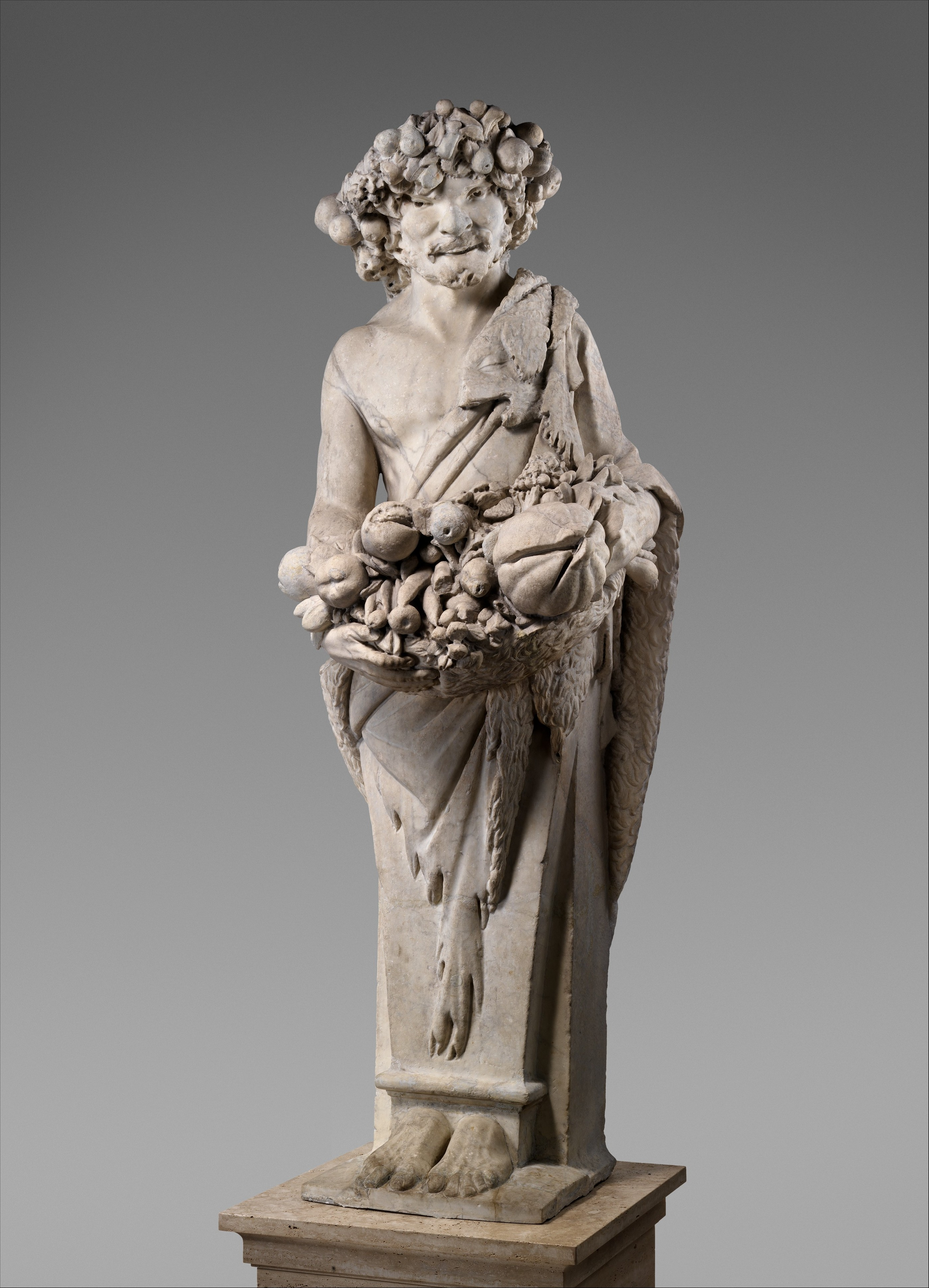 Italian, Rome; Term; Sculpture